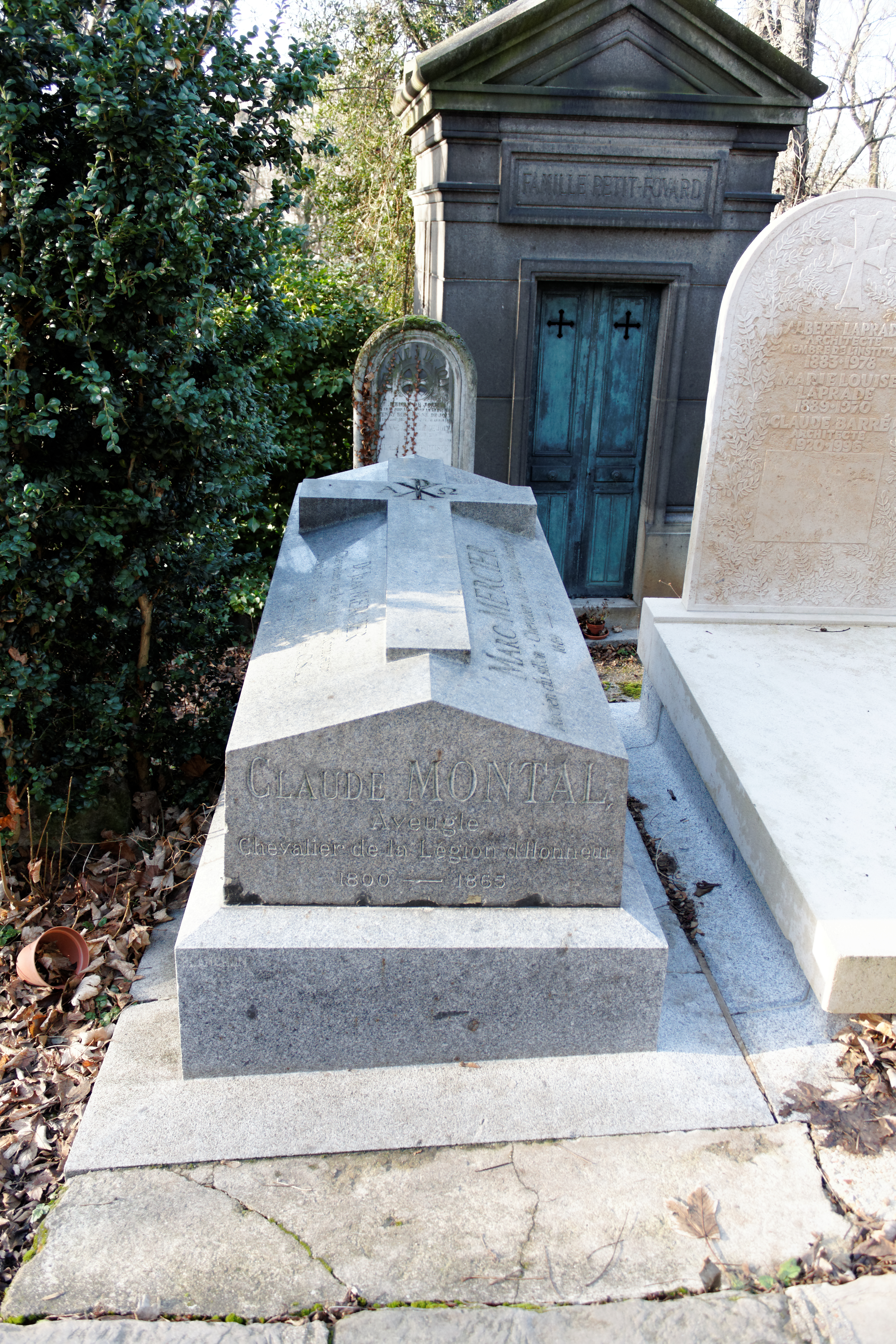 Vue d'ensemble